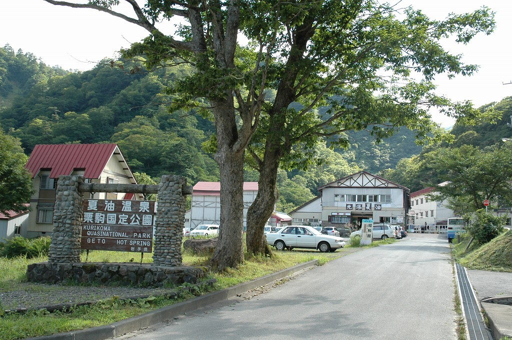 夏油温泉 撮影者：User:EMPEX 2006.09.02